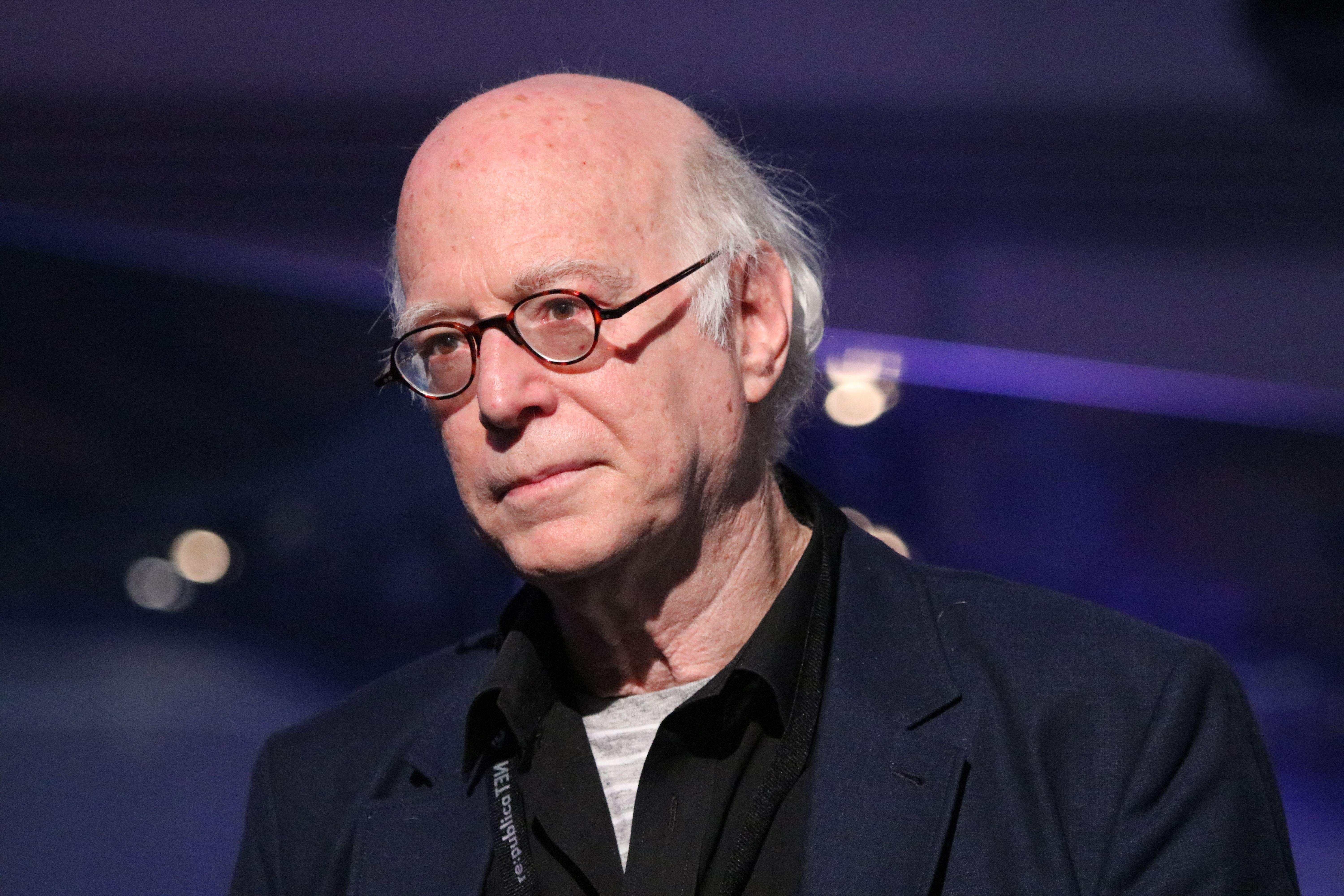 Richard Sennett